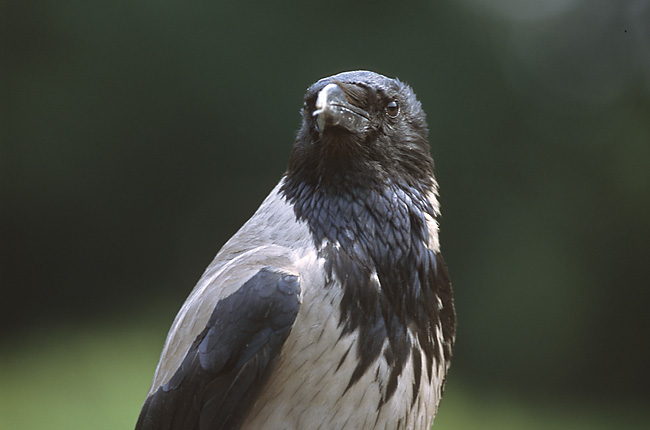 Corvus corone cornix